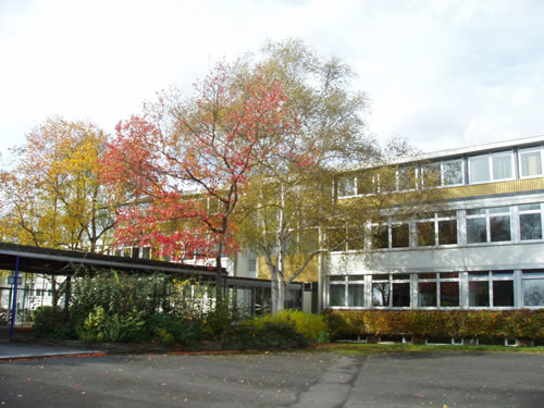 Schulgebäude des Weiterbildungskollegs Bonn, Langwartweg 72